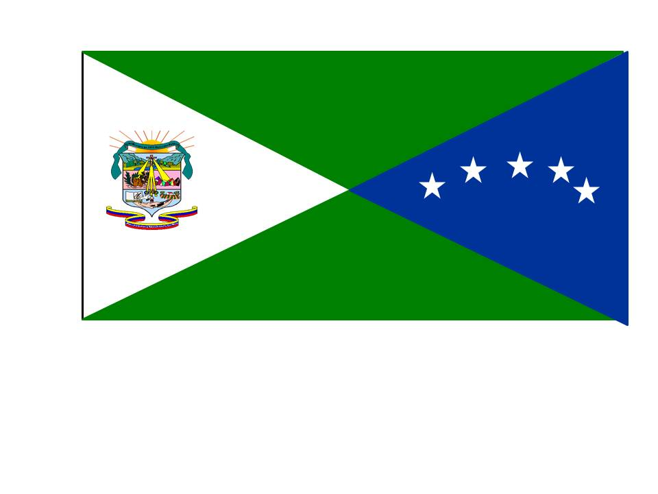 bandera municipio de antonio romulo costa